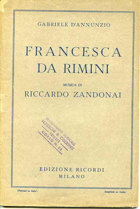 Copertina del libretto del 1914 dell'opera lirica "Francesca da Rimini" di Riccardo Zandonai.